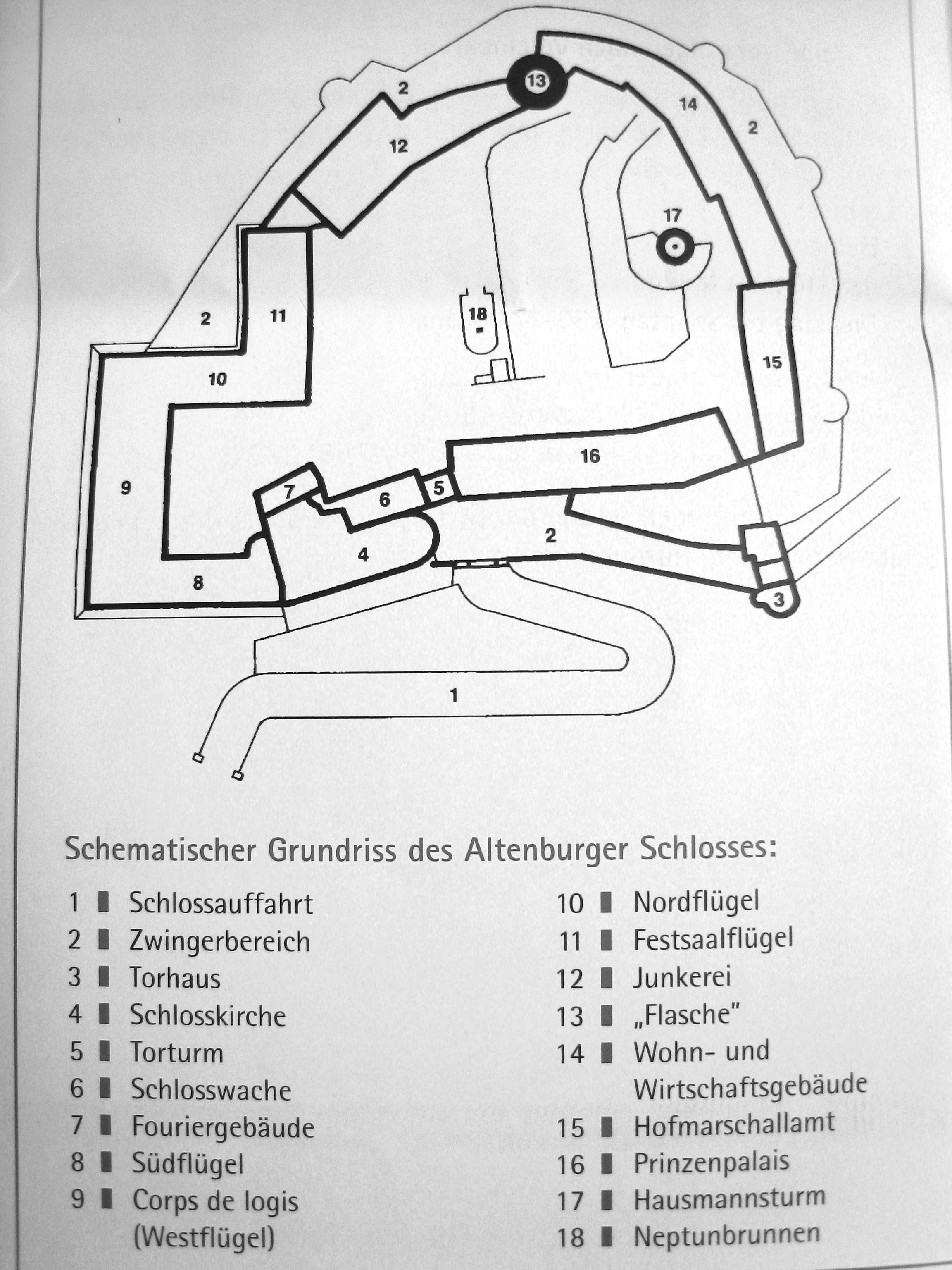 Plan des Schlosses Altenburg